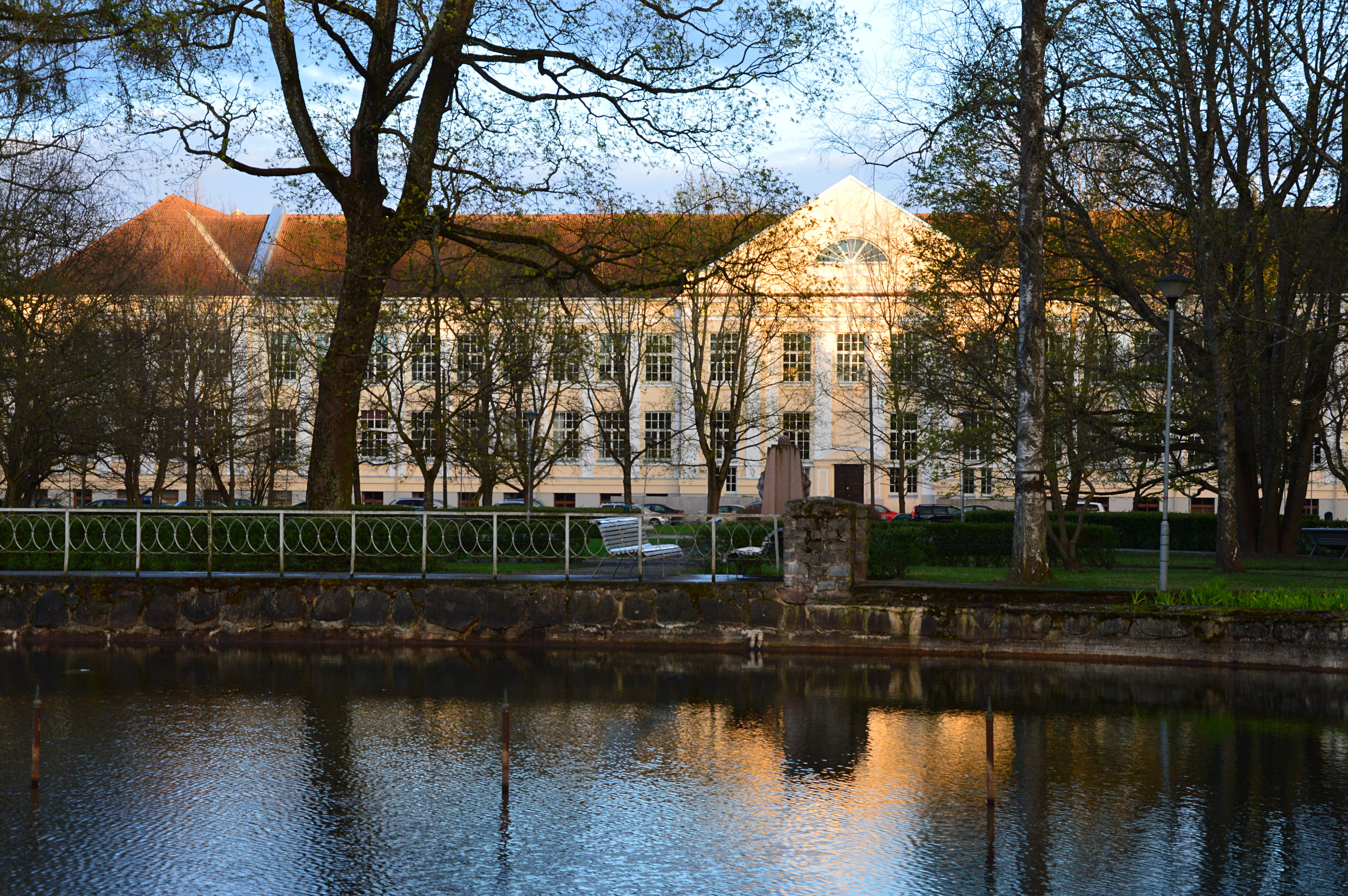 Vanemuise 46 õppehoone ja Hurda park.